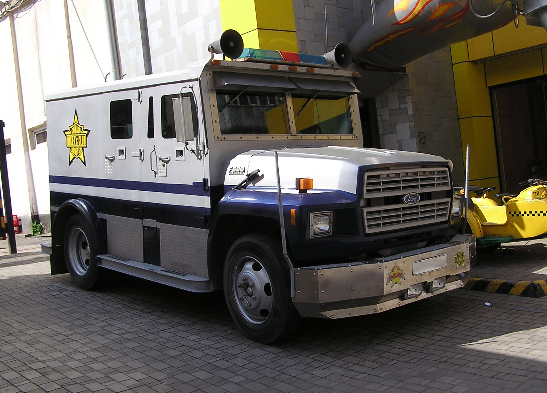 Автомобиль в Донецке